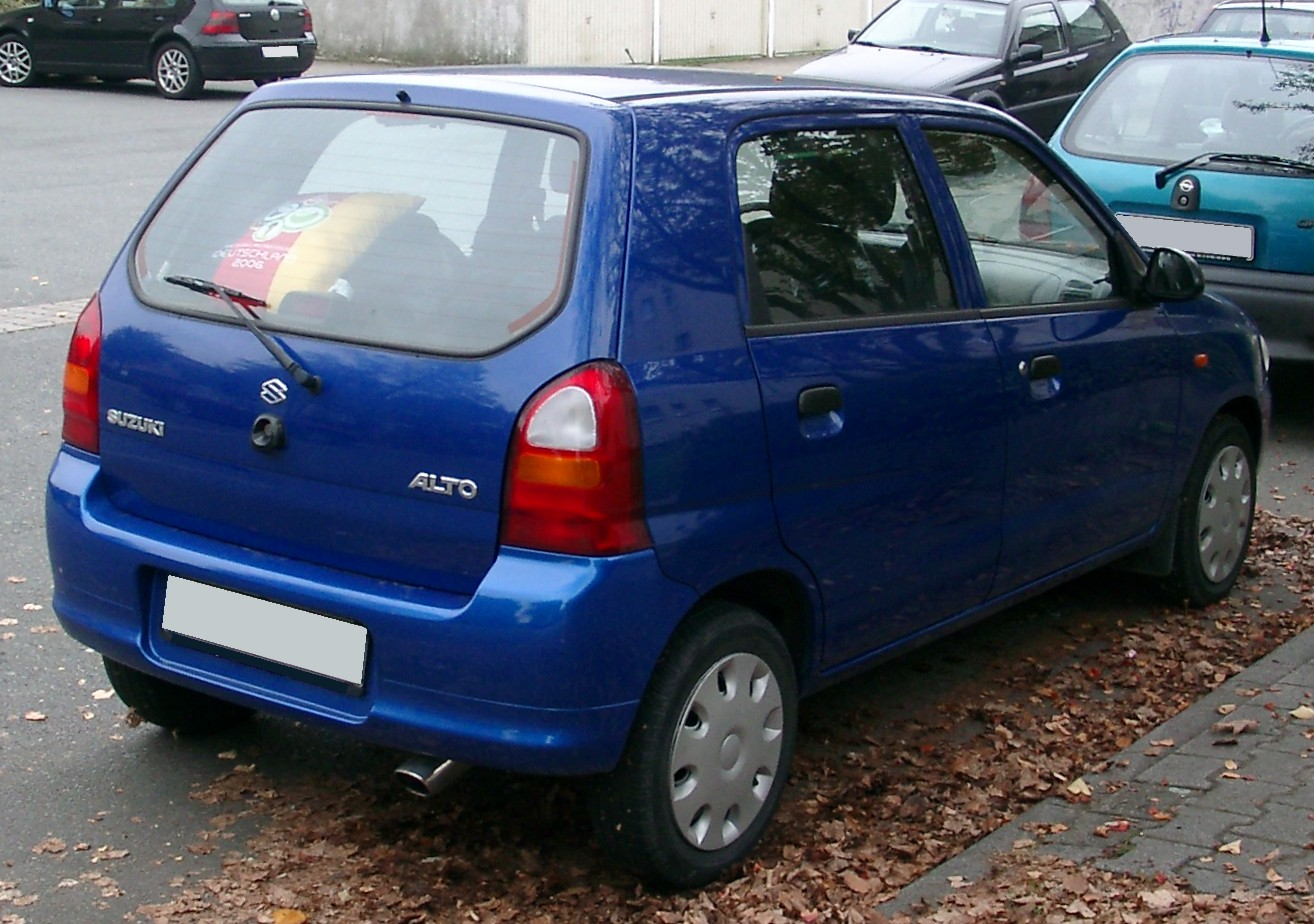 Suzuki Alto